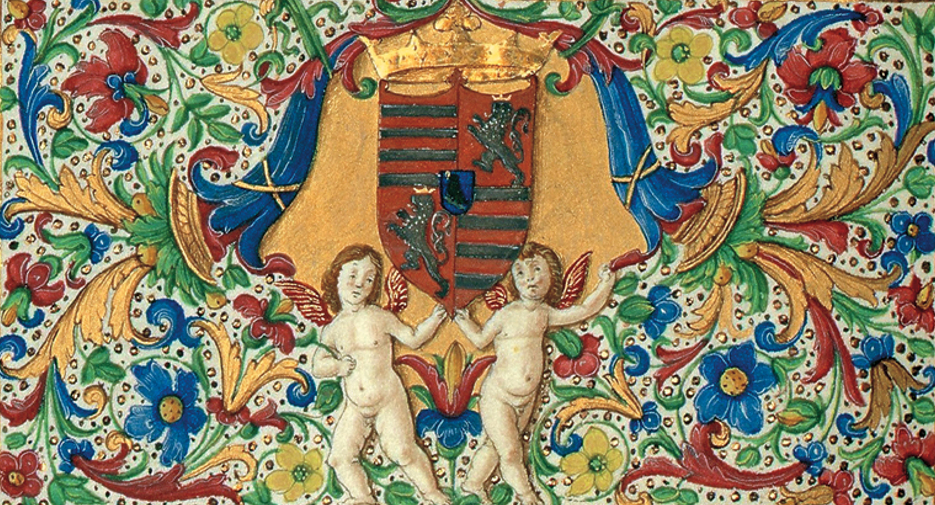 Mátyás király hollós címere a philostratus kódex díszes lapján